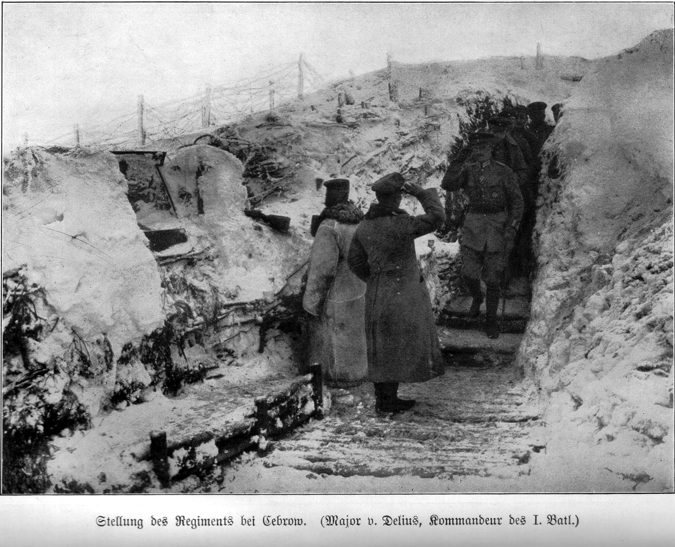 Die Stellung des Garde-Füssilier-Regiments bei Chebrow am Zwinin (Feb. oder März 1915)